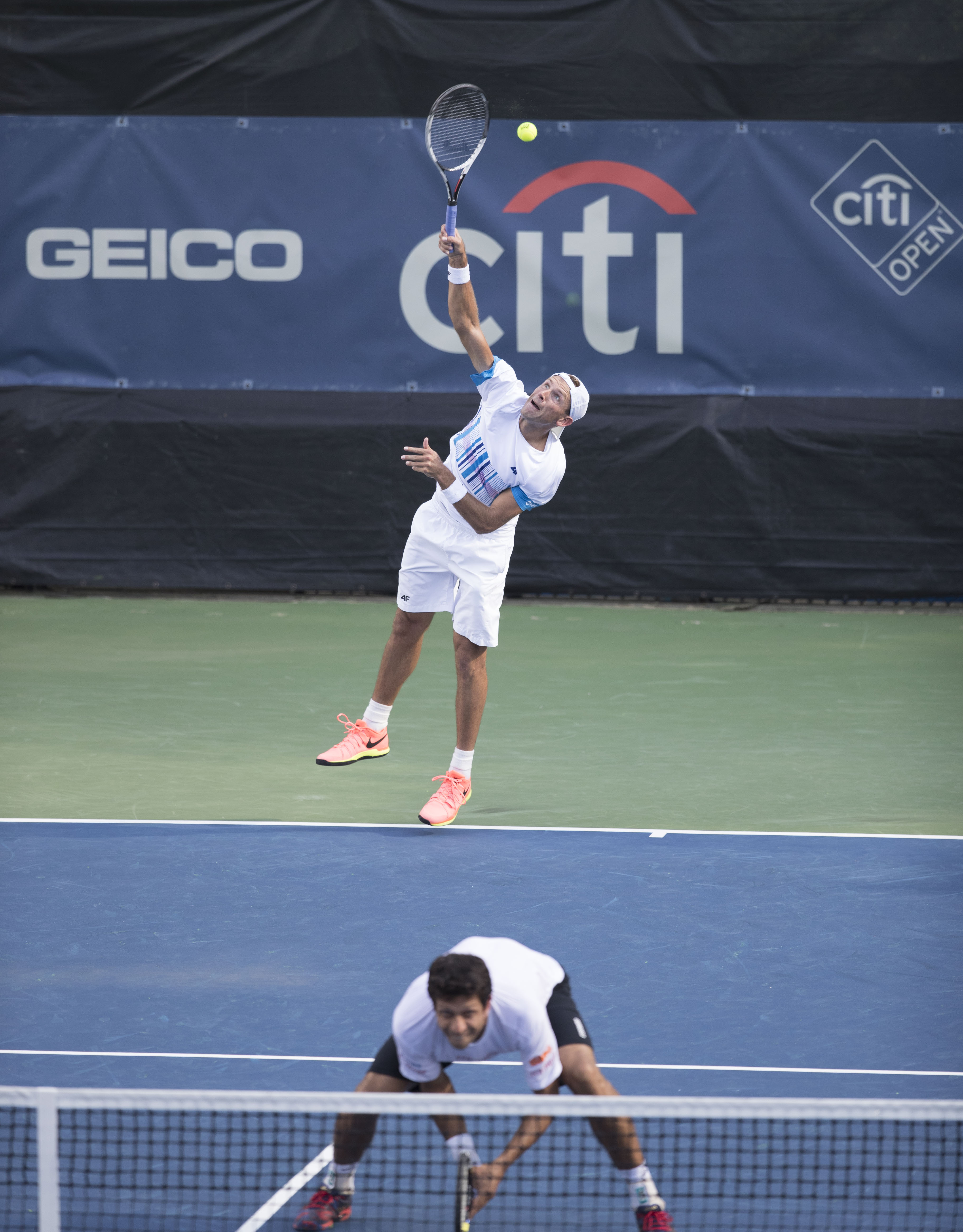 Citi Open Tennis 2017